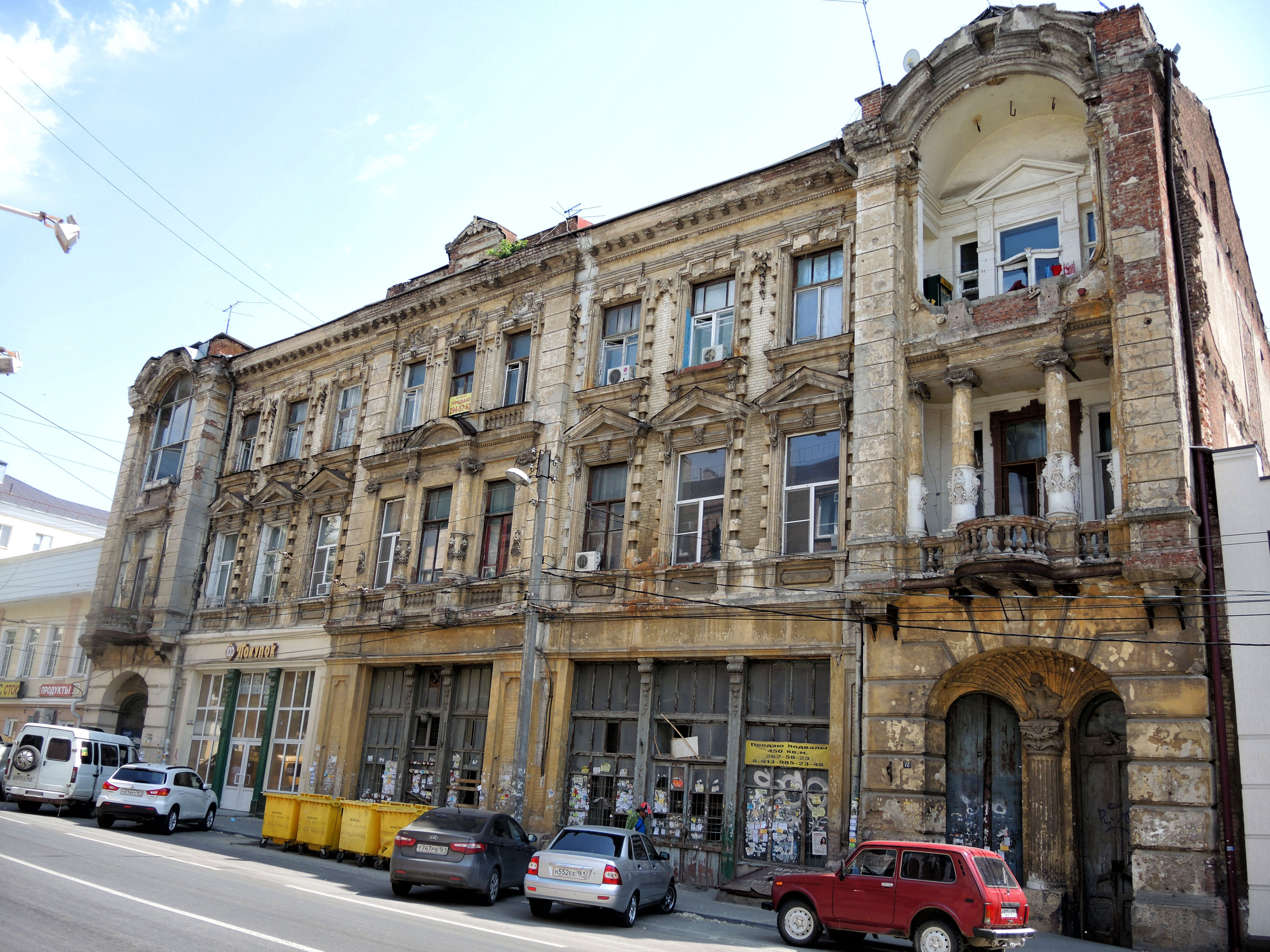 Доходный дом наследников В.Р. Максимова: улица Московская, 72/27/71, переулок Газетный, Ростов-на-Дону, Ростовская область